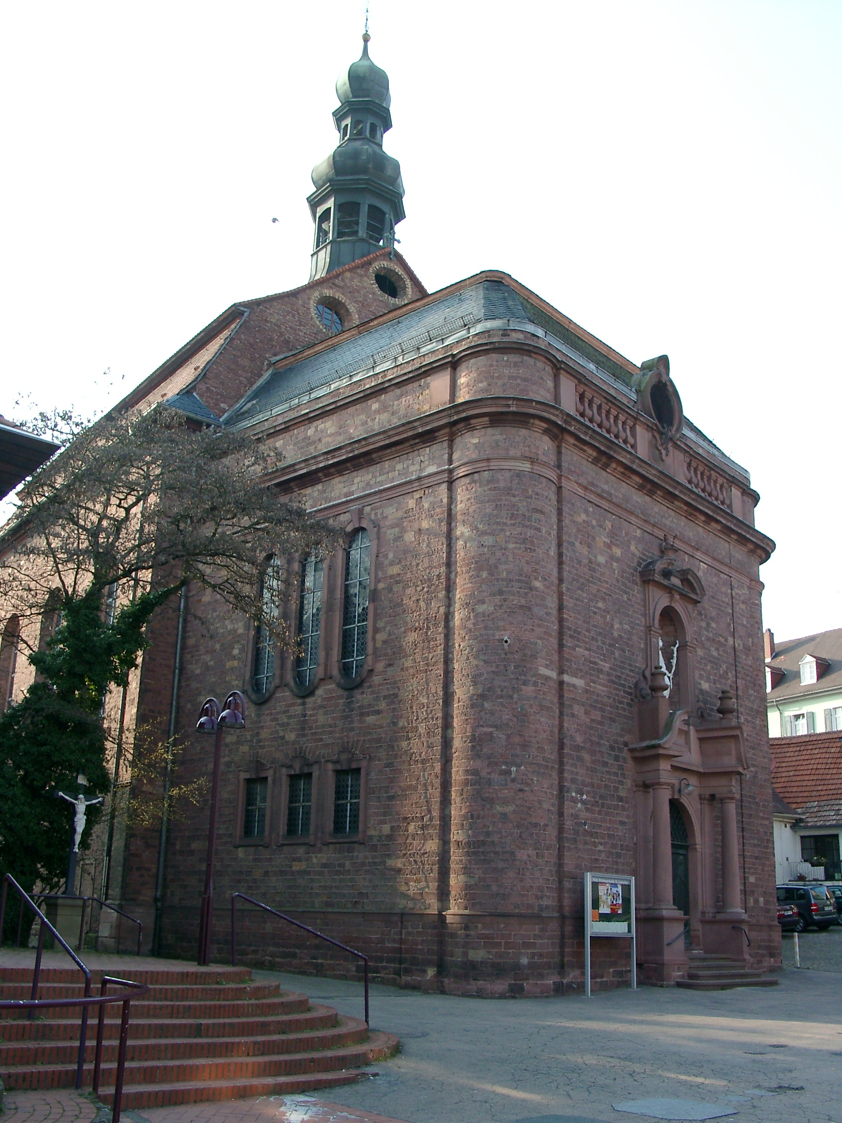 Wiesloch, Kirche der Katholischen Kirchengemeinde St. Laurentius